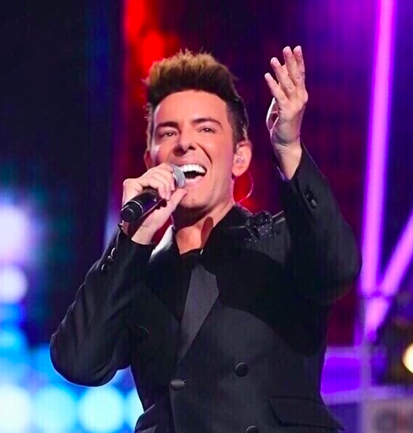 Cantante español Juan Ricondo cantando en directo en el festival New Wave de Sochi